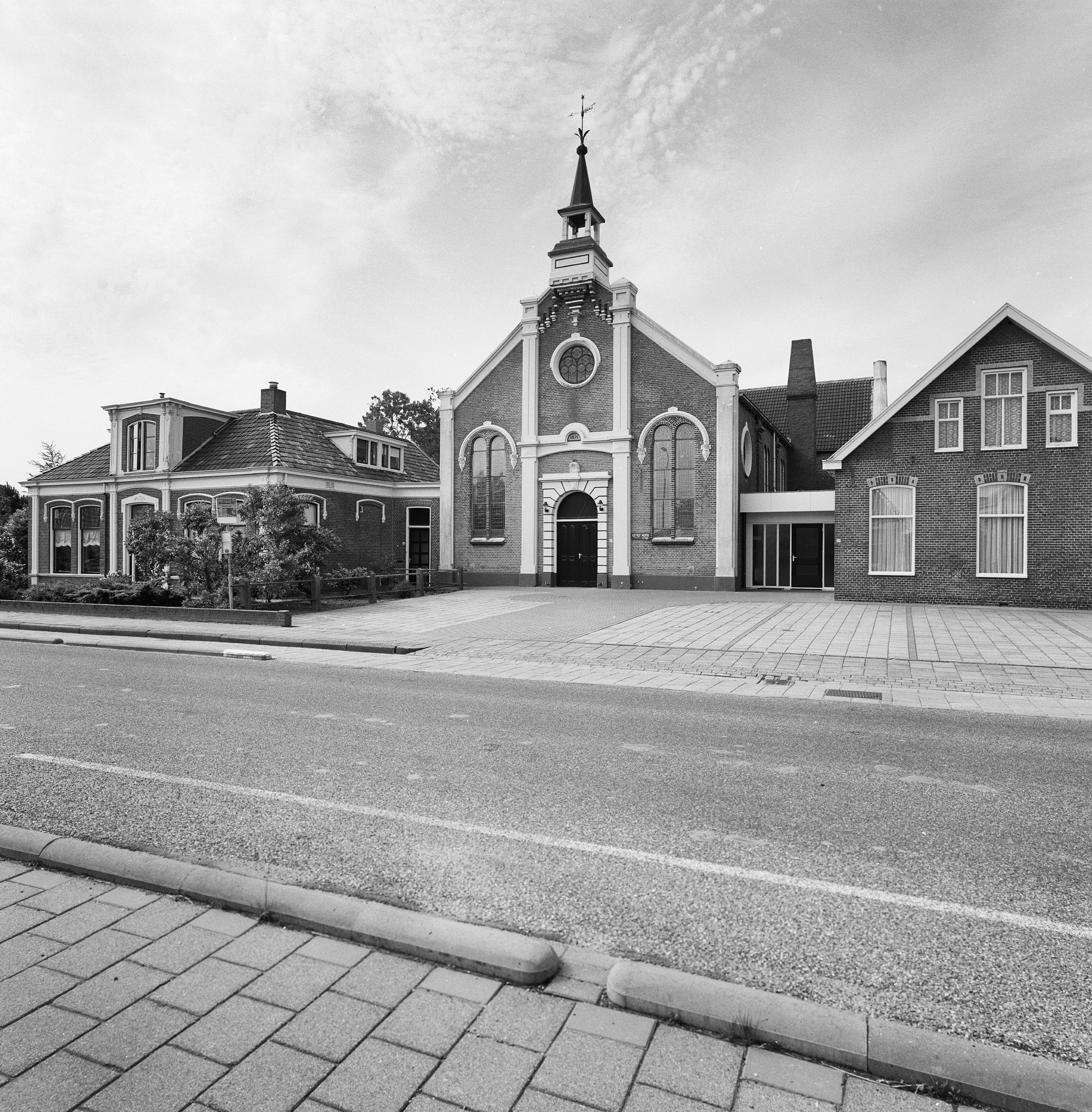 Gereformeerde kerk Vrijgemaakt: Overzicht westgevel met dakruiter en voorgevel en rechter zijgevel pastorie (opmerking: Gefotografeerd voor Monumenten In Nederland Groningen)